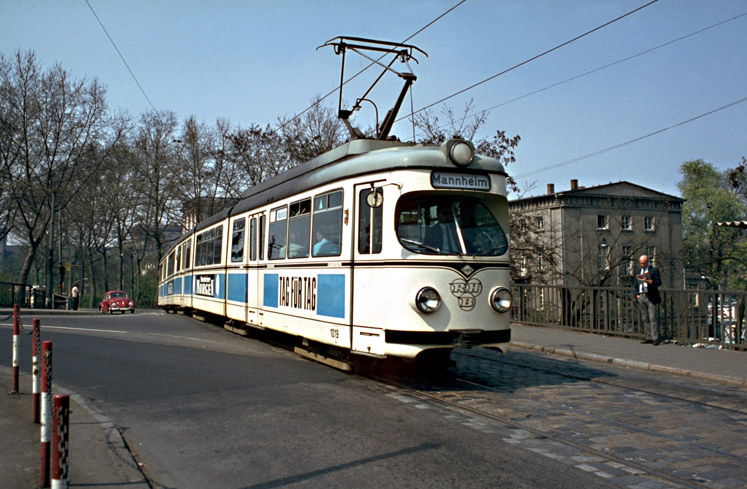 Twaalfassige Duwag tram in Mannheim (BRD)